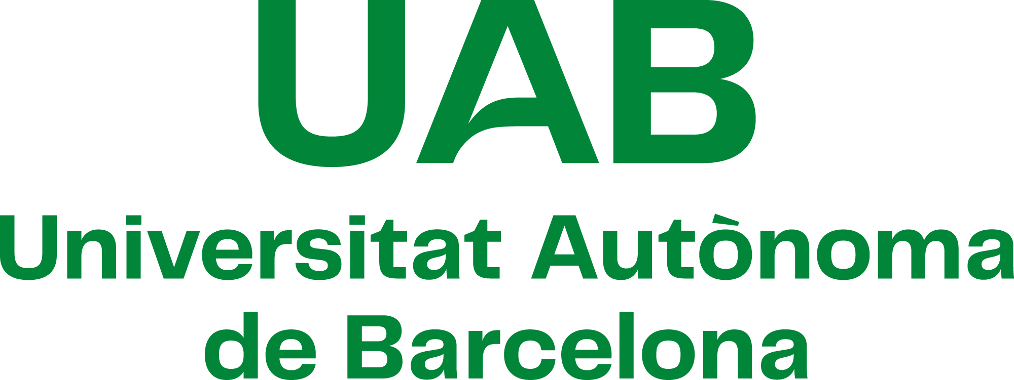 Logotip de la Universitat Autònoma de Barcelona